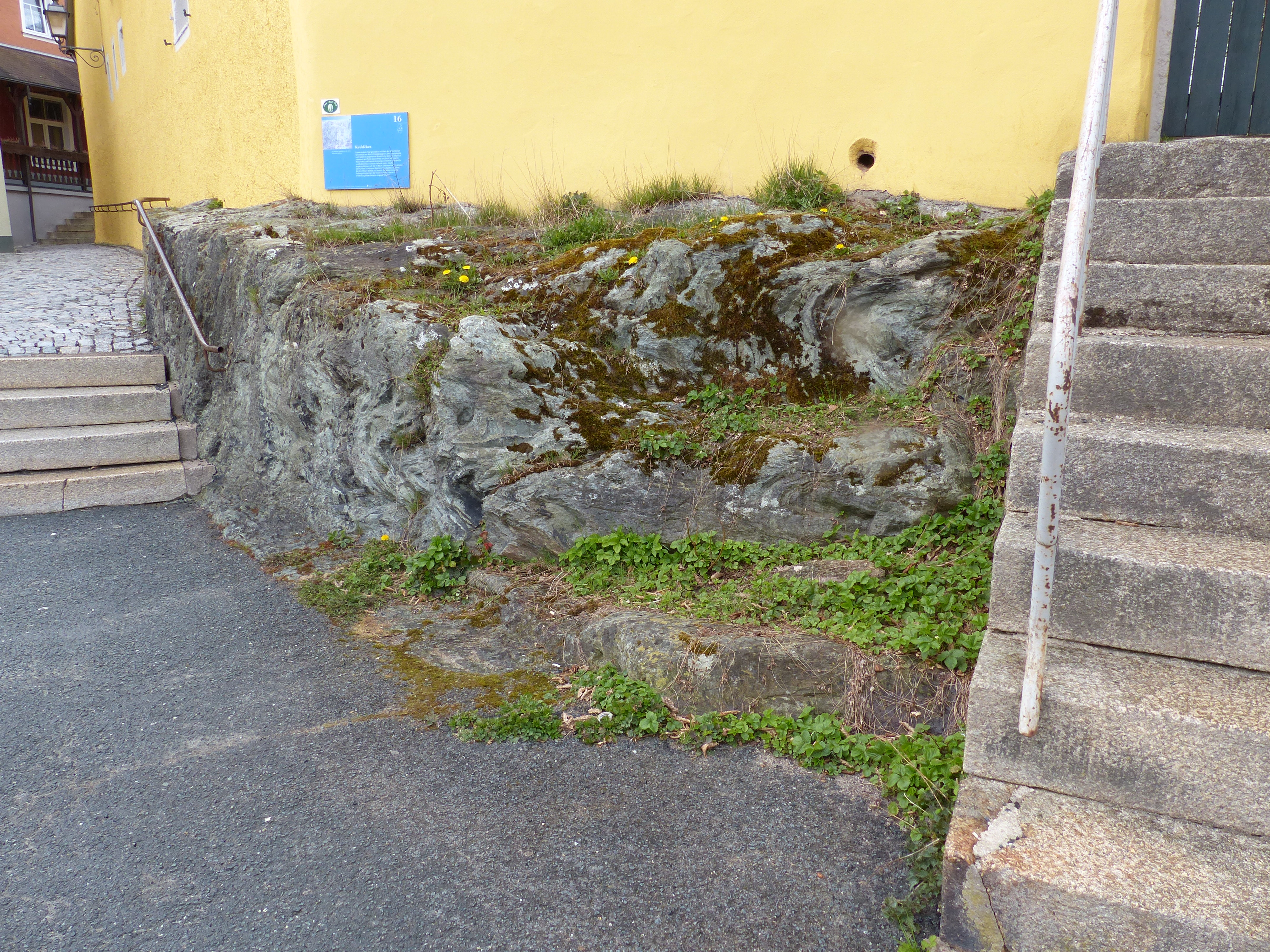 Geotop: Kirchfelsen in Schwarzenbach an der Saale